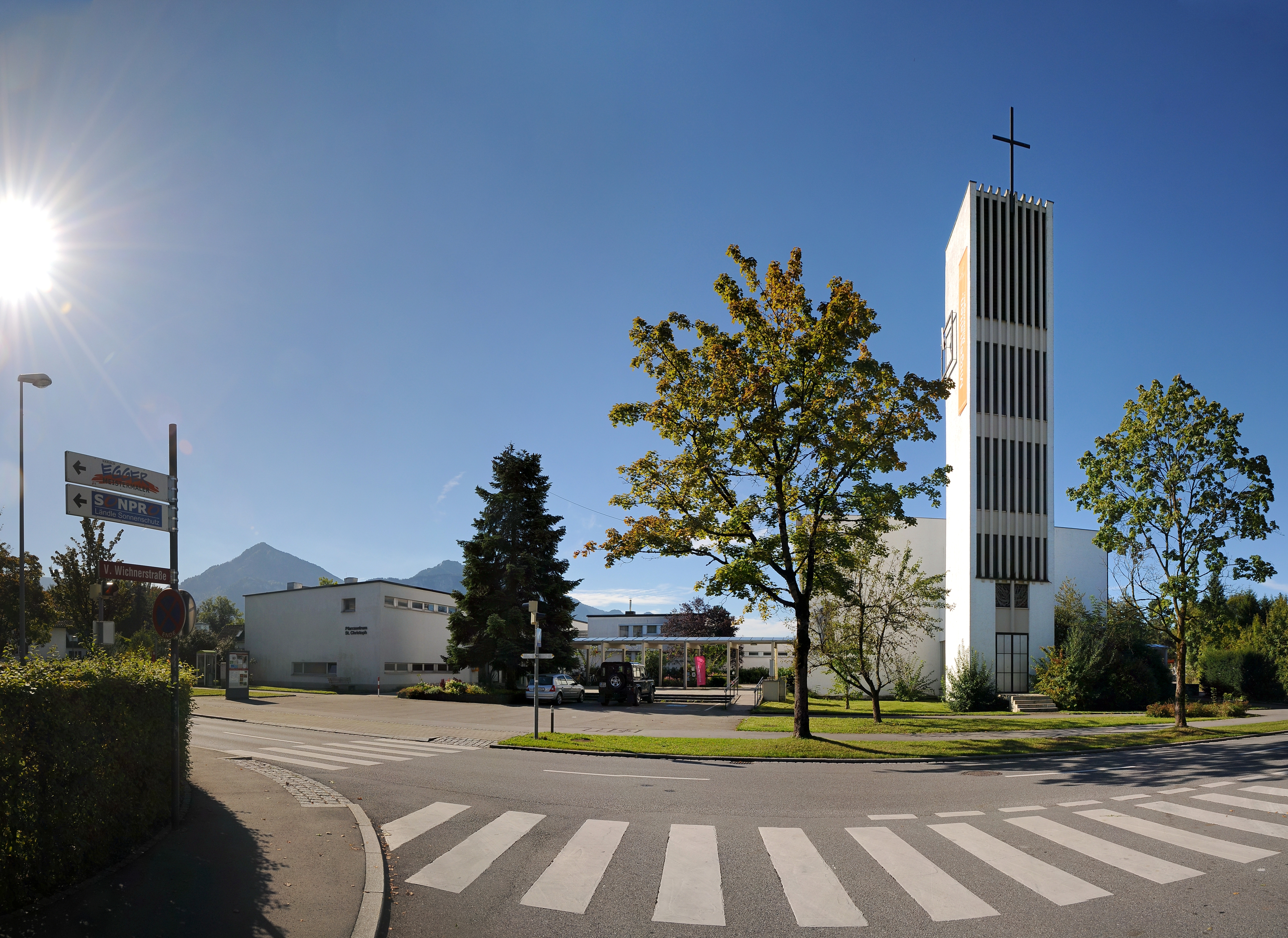 Pfarrkirche St. Christoph im Rohrbach in Dornbirn erbaut nach Pänen von Norbert Kopf und Norbert Klotz in den Jahren 1963/64